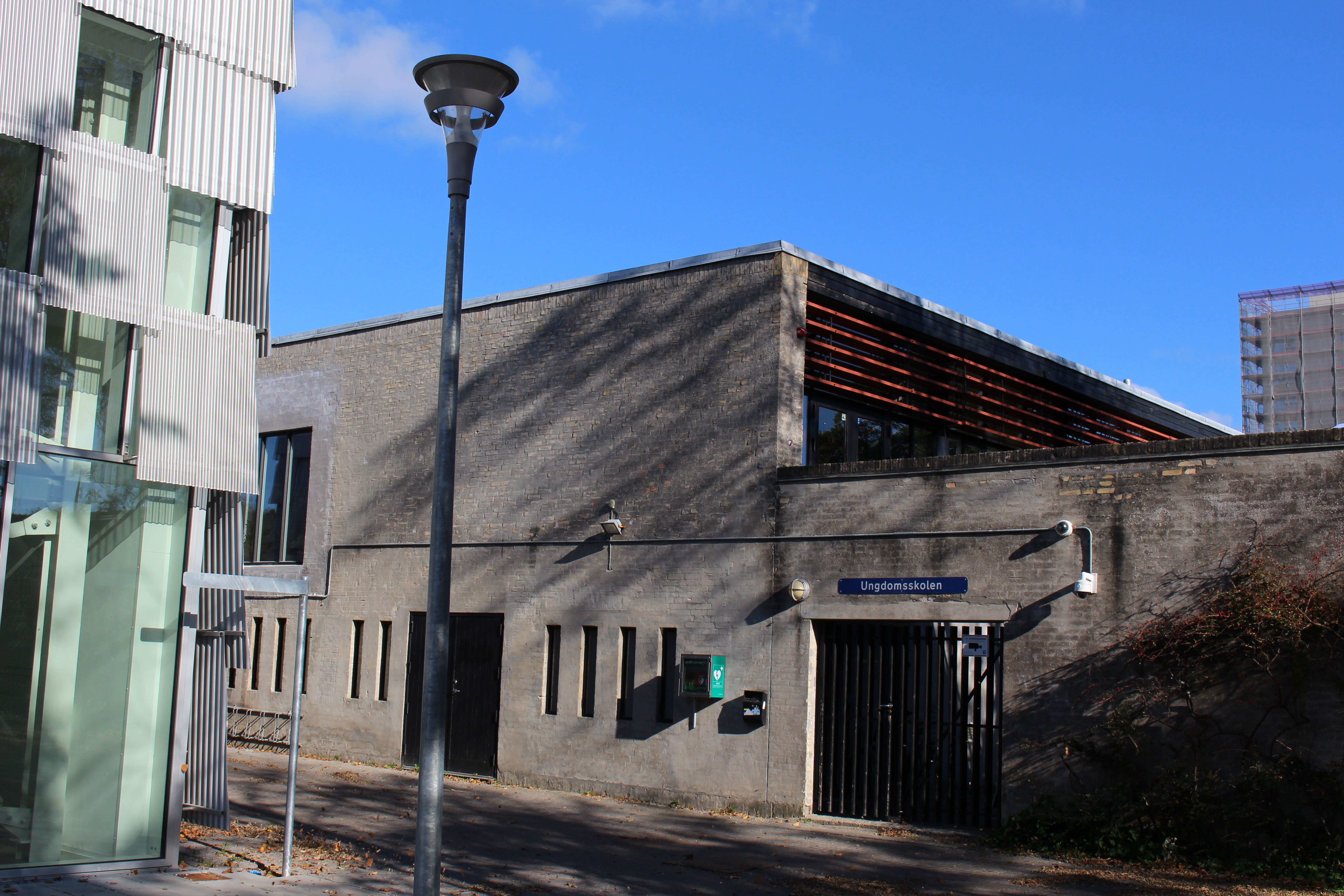 Ungdomsskolen i Albertslund